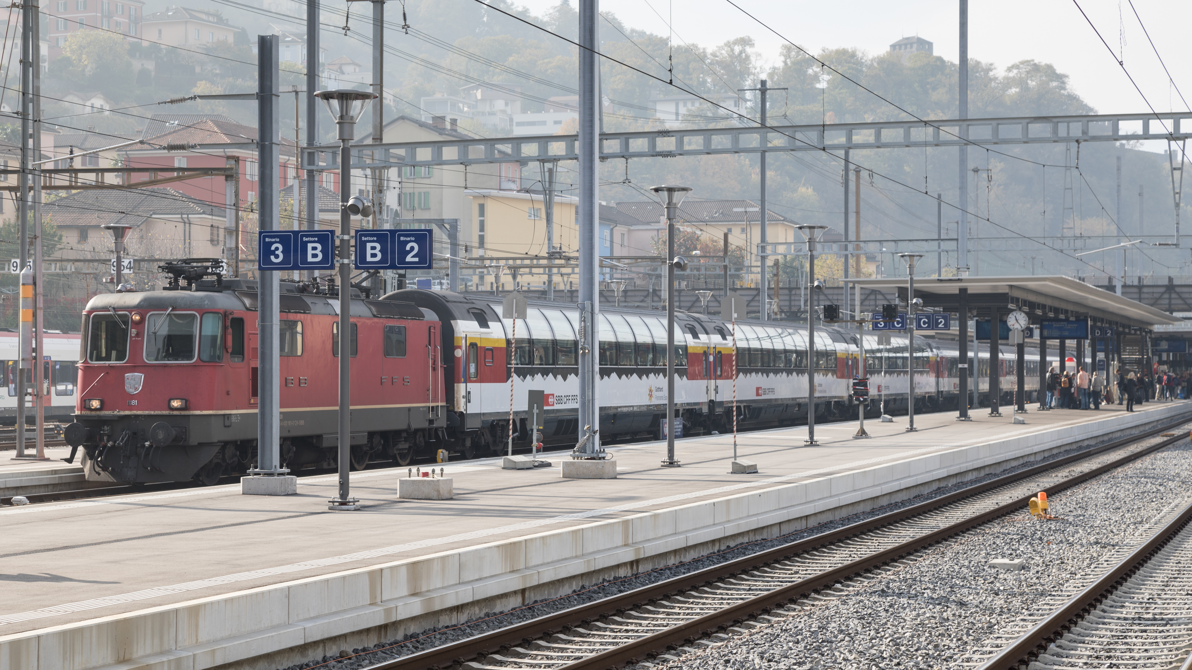 Wer die Gotthardstrecke "klassisch" erleben möchte nutzt den Gotthard Panorama Express. Bellinzona, Okt. 2017